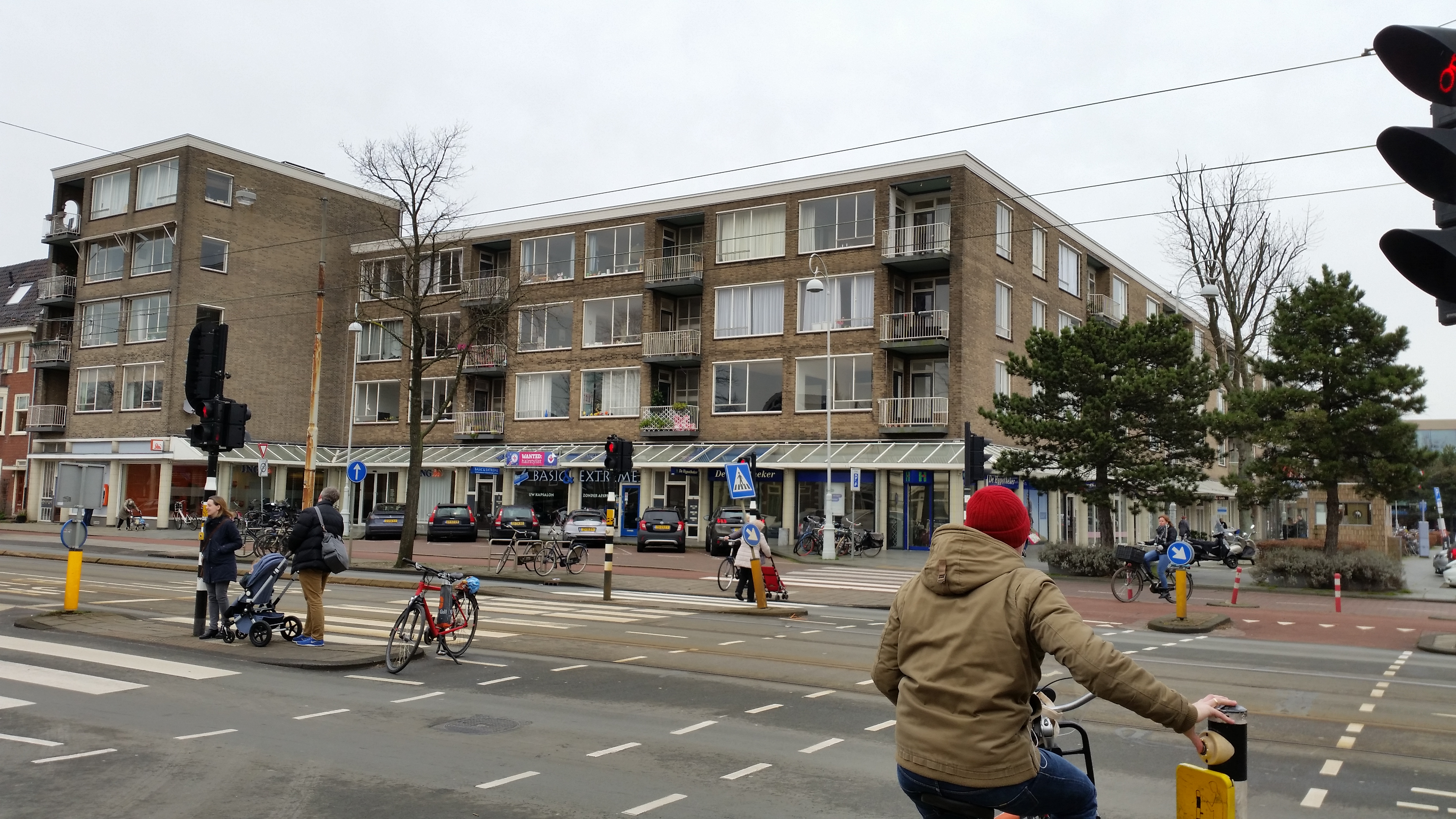 Bouwsels van Piet Zanstra aan de Middenweg met rechts het Christiaan Huygensplein, Amsterdam-Oost. Op zaterdag 5 januari 1991 kwam het plein in de landelijke media in het nieuws naar aanleiding van zinloos geweld waarbij de eigenaar en winkelier Jan Meyer en zijn hond, koelbloedig werden neergeschoten.